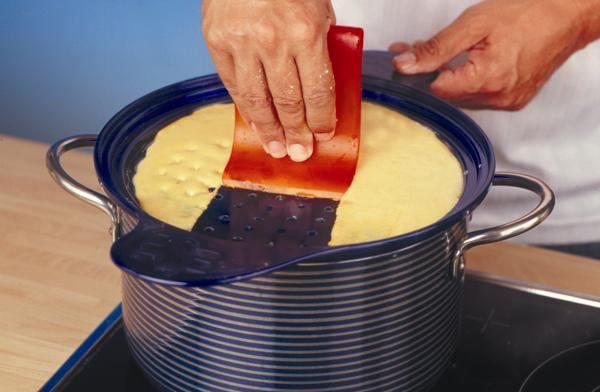 Das Spätzlesieb ist seit nunmehr 10 Jahren die neue Alternative zum Spätzlehobel